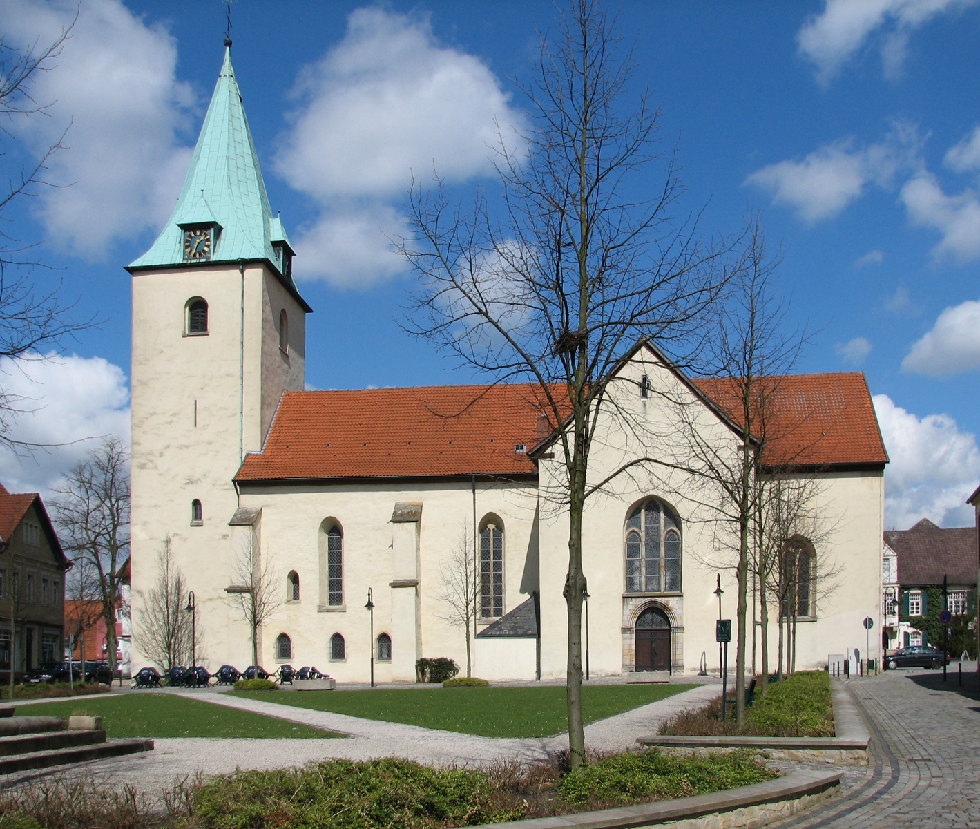 Dissen a.T.W., Mauritiuskirche